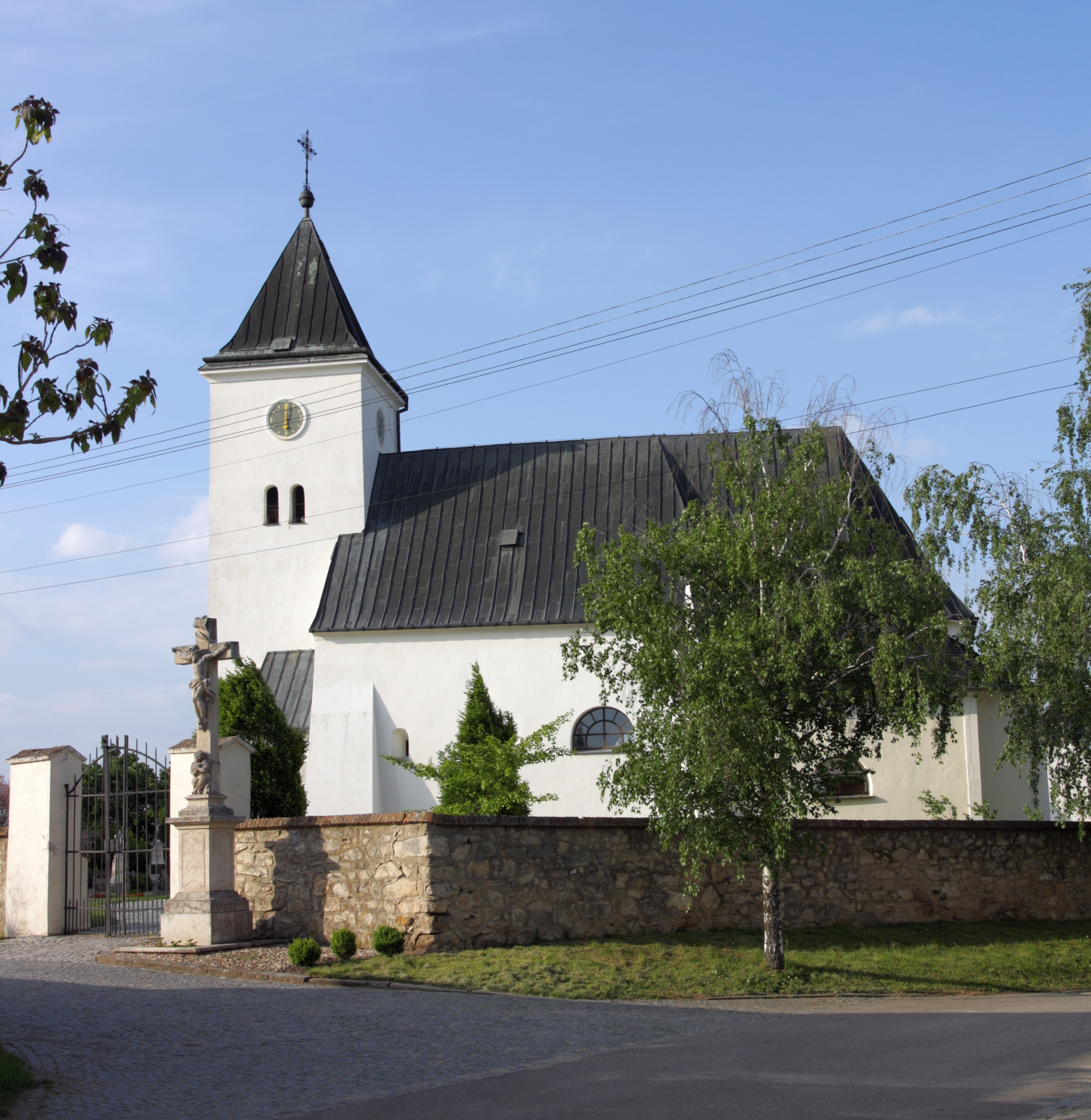 Kostel Nejsvětější Trojice